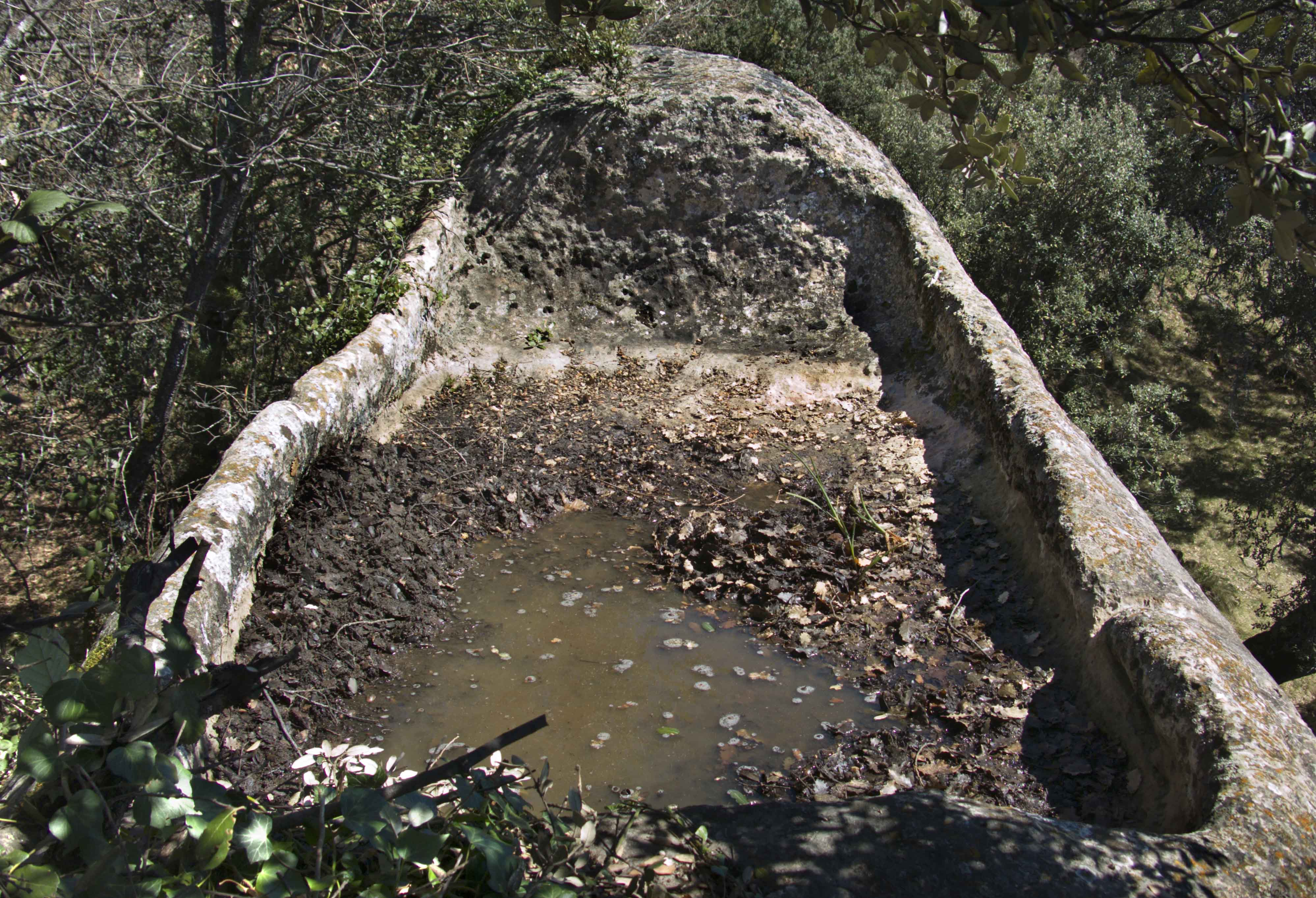 Cup de vi o Trull de vi en Rin de la Carrasca (Rin de Dalt), en el municipi d'Isàvena (Ribagorça aragonesa) de l'any 1.030 d.C.